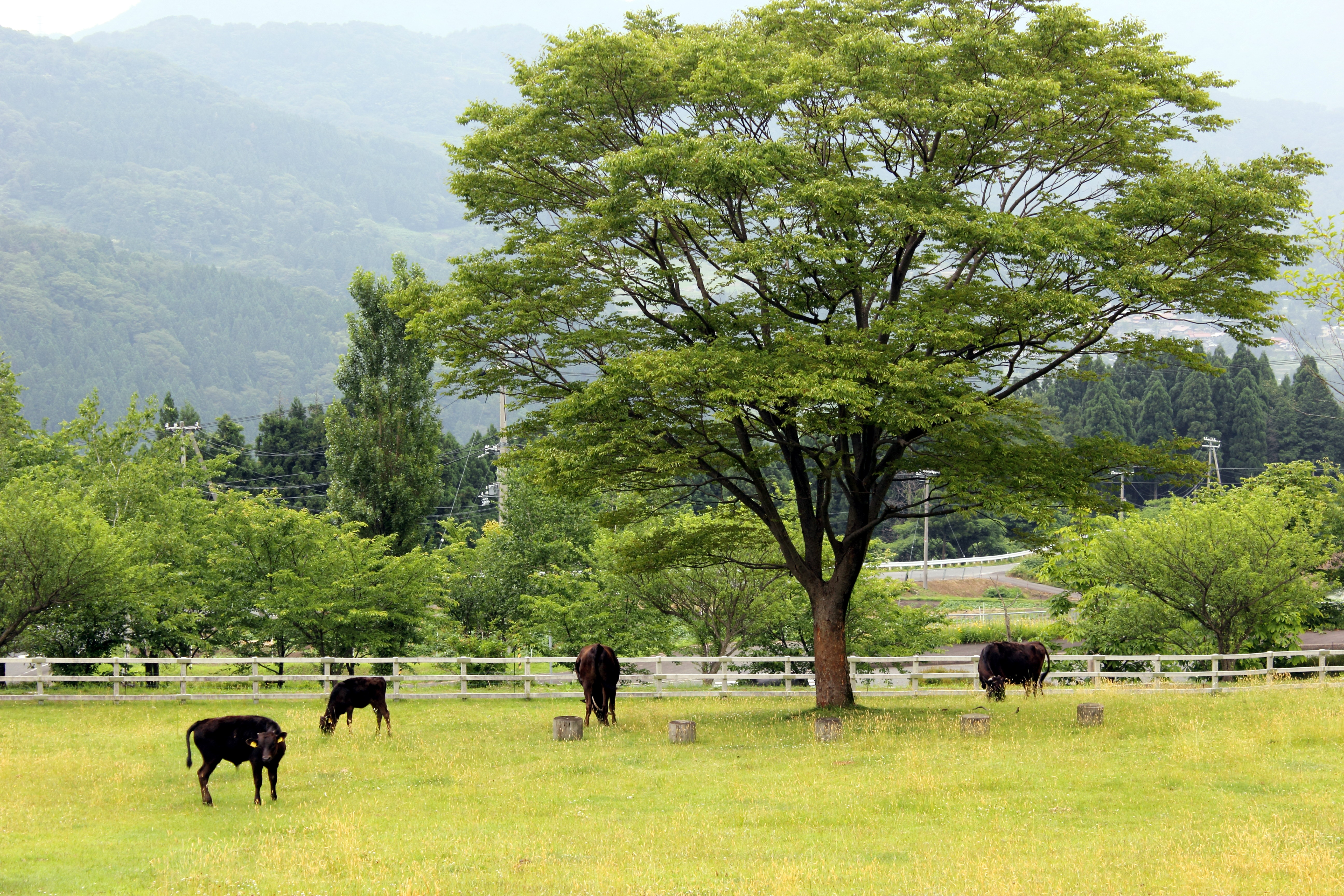 但馬牧場公園 放牧場